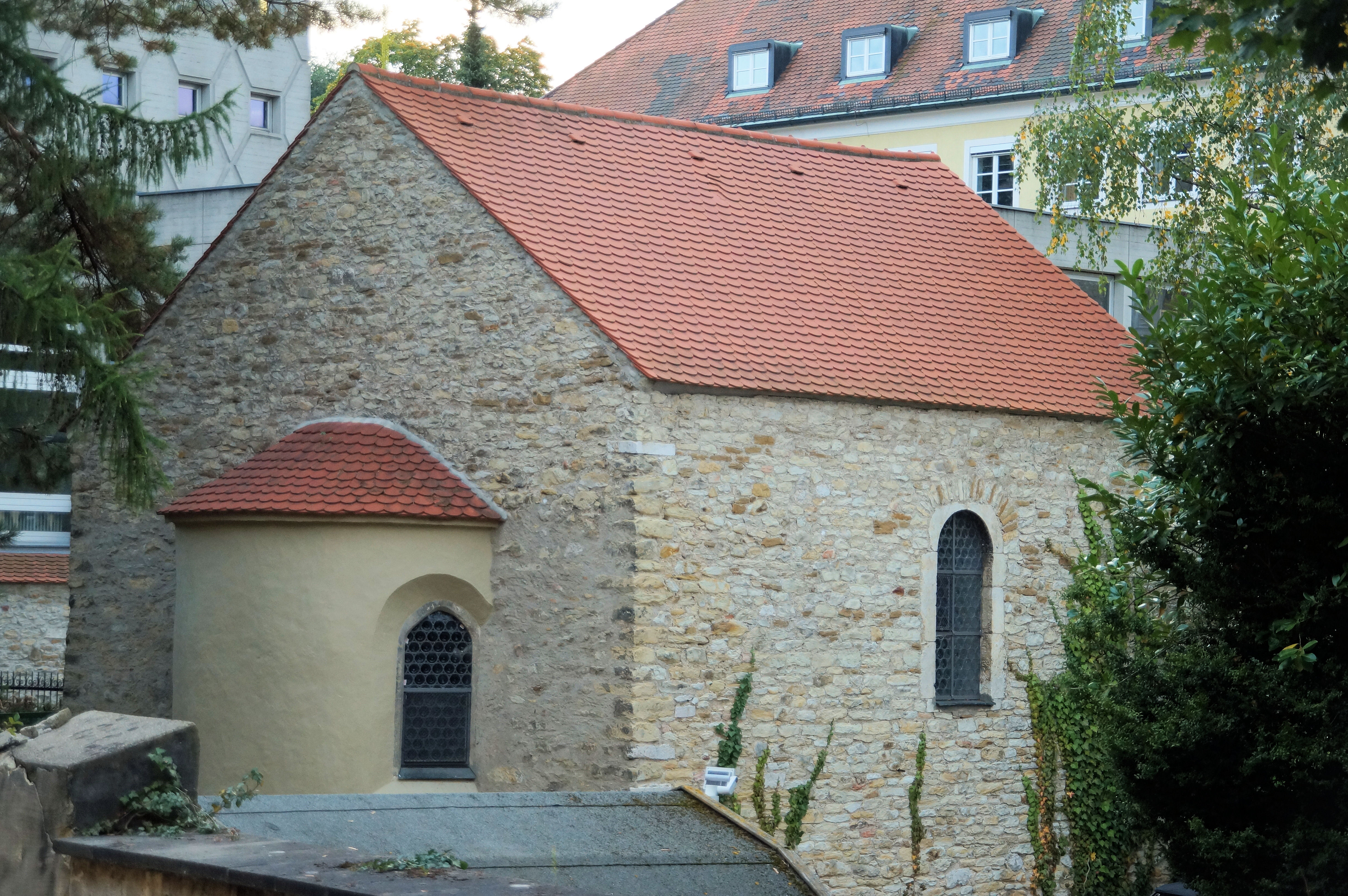 Mercherdachkapelle, Saalbau mit Satteldach und Ostapsis, Bruchsteinmauerwerk, um 1200, Veränderungen nach Kriegsbeschädigung 1945 This is a photograph of an architectural monument.